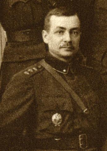 Kinrdalmajaor Andres Larka (de en)